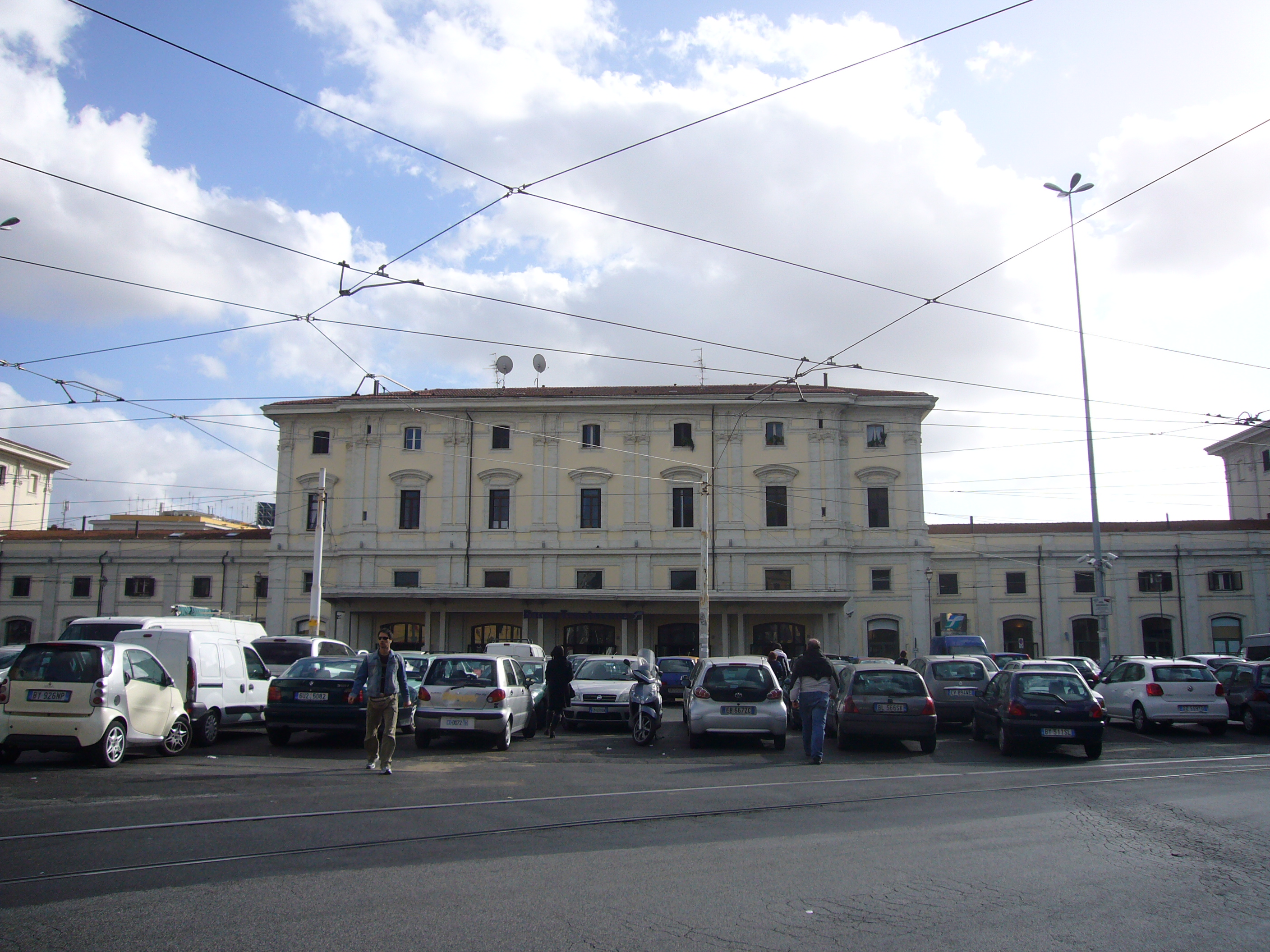 Roma, stazione di Trastevere, esterno